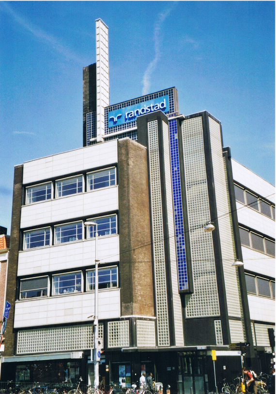 Gebouw De Volharding, Den Haag (Jan Buijs, 1928)